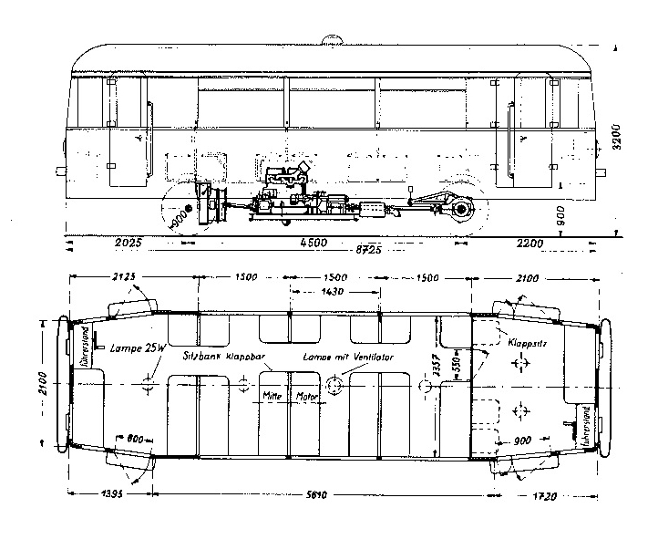 Maßskizze des WUMAG-Triebwagens mit 4,5 m Achsstand